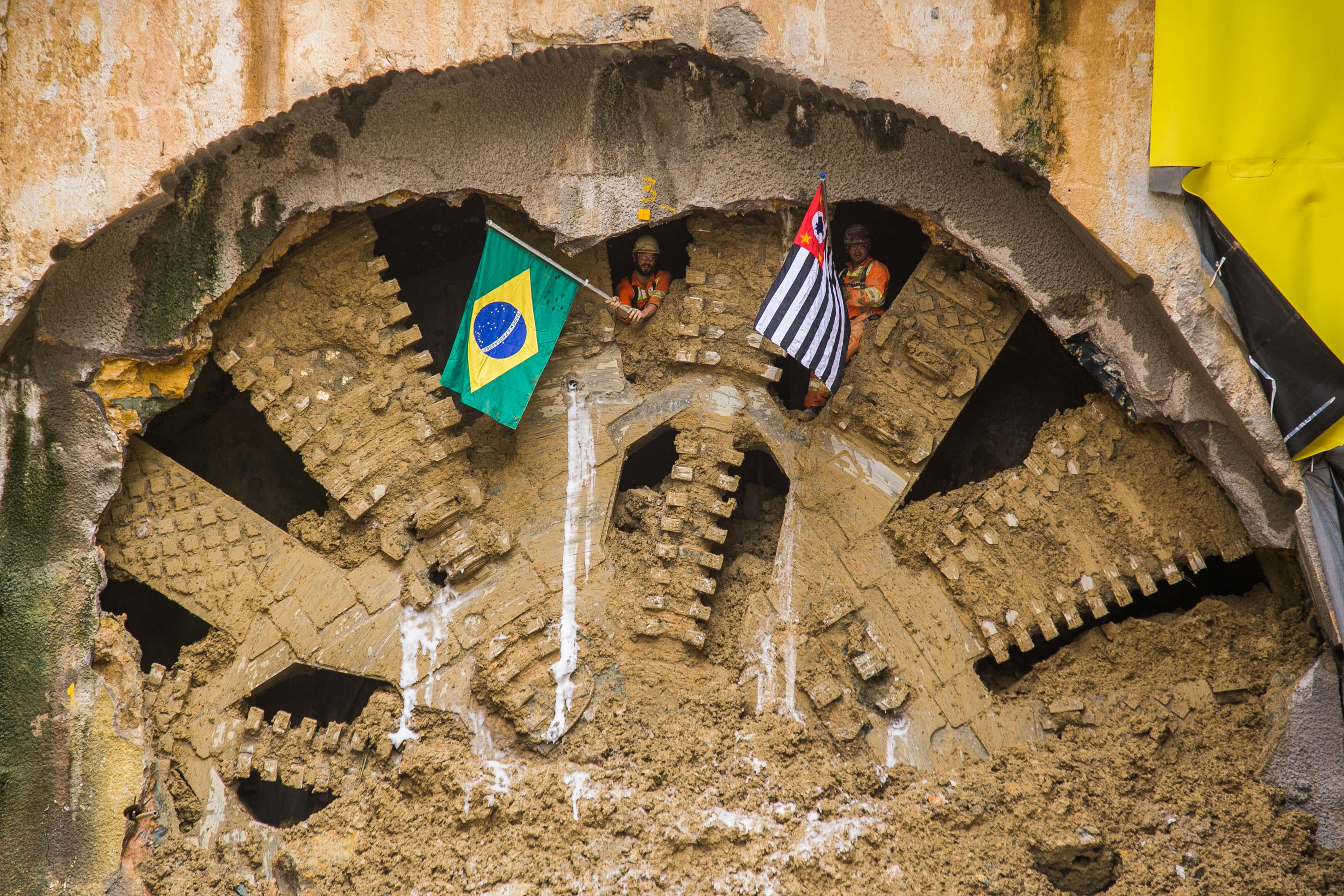 O governador Geraldo Alckmin durante a chegada chegada da tuneladora Shield, o “Tatuzão”na futura Estação AACD Servidor, linha 5-Lilás do Metrô de São Paulo. Data: 30/03/2015. Local: São Paulo/SP. Foto: Edson Lopes Jr/A2Img.